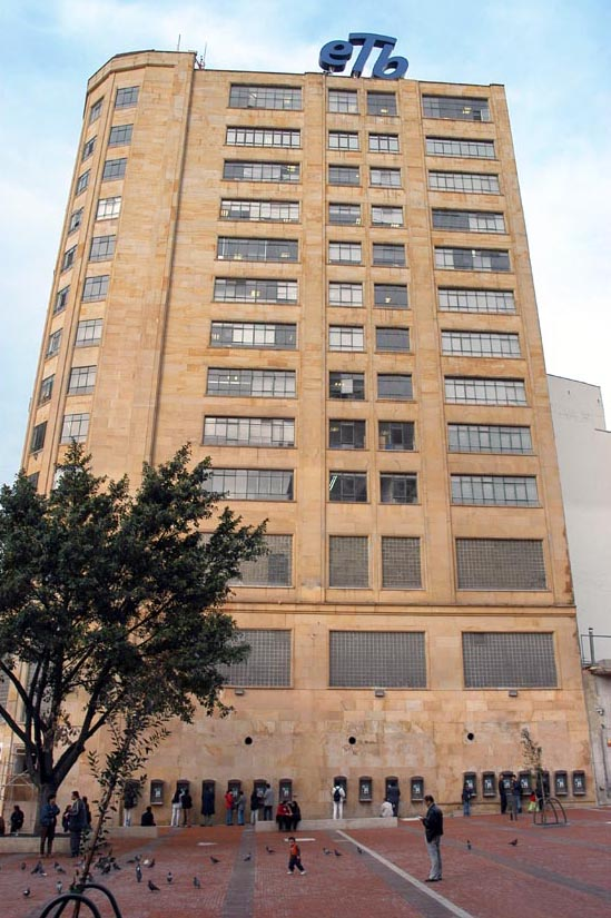 Sede Centro de ETB en Bogotá, carrera 7 con calle 20